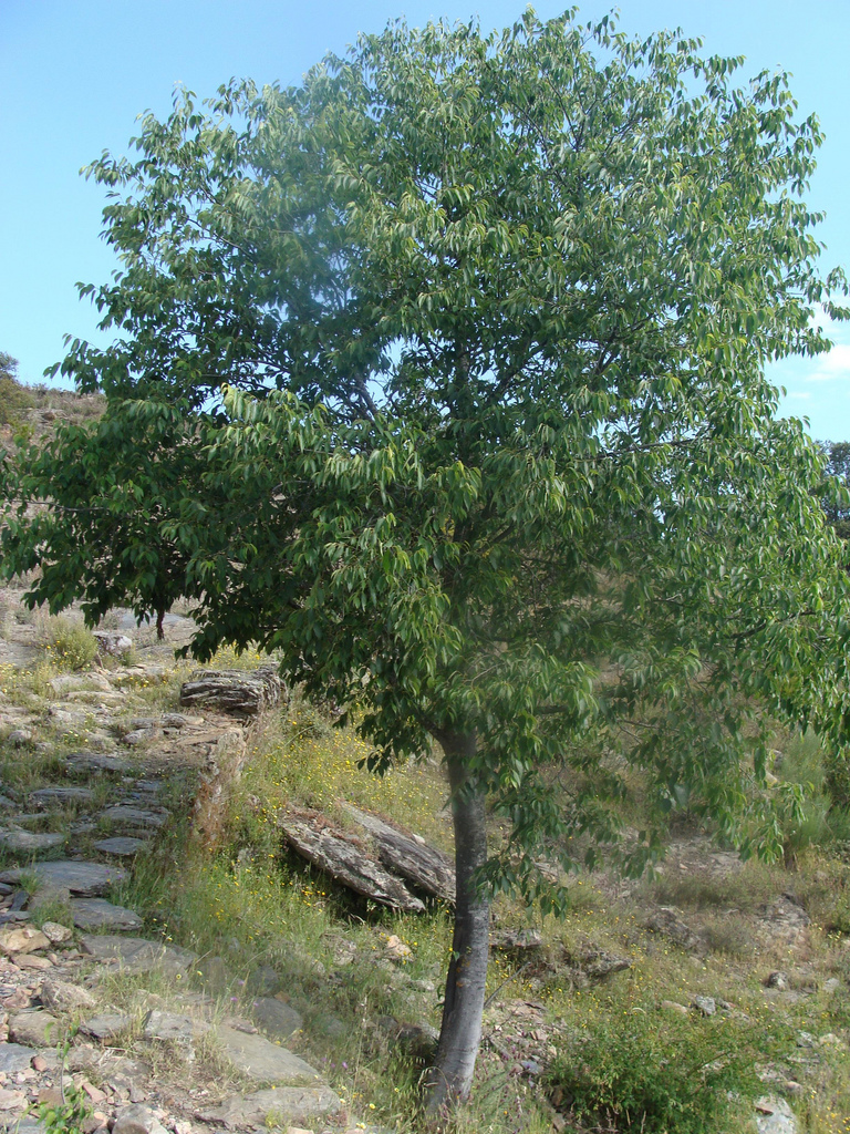 Celtis australis (almez) en el Parque Nacional de Monfragüe.